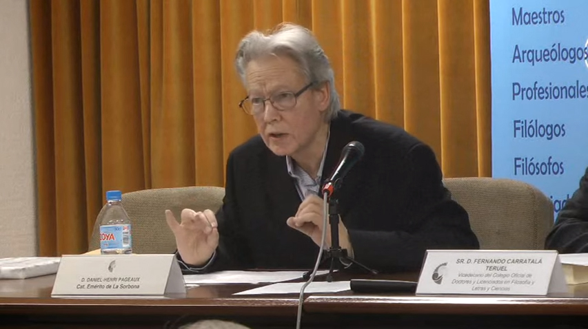 Daniel-Henri Pageaux nel gennaio del 2016.